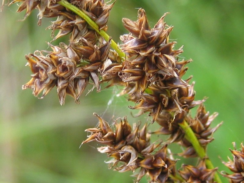 Rispen-Segge Carex paniculata, Weißer See, Mecklenburg-Vorpommern